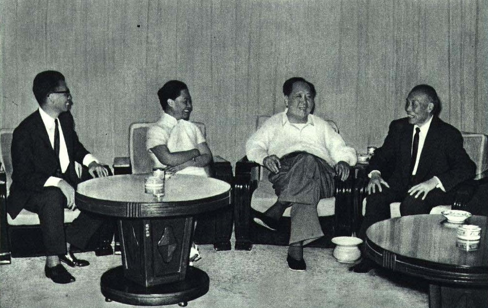 1965-9 1965 李宗仁夫妇返回中国大陆